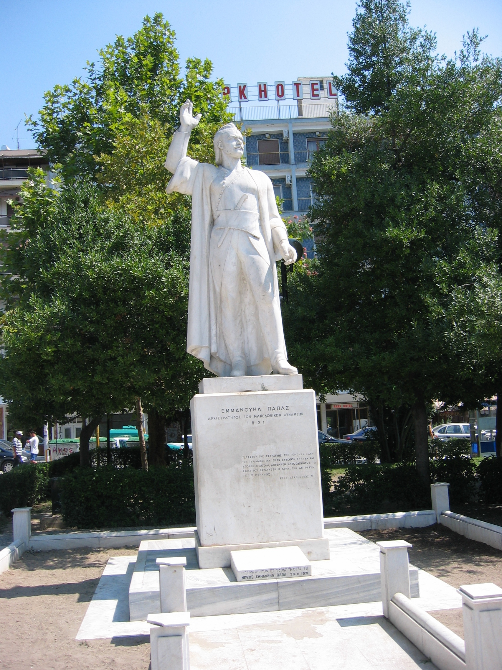 La statue d'Emmanuel Pappas, Serrès, Grèce